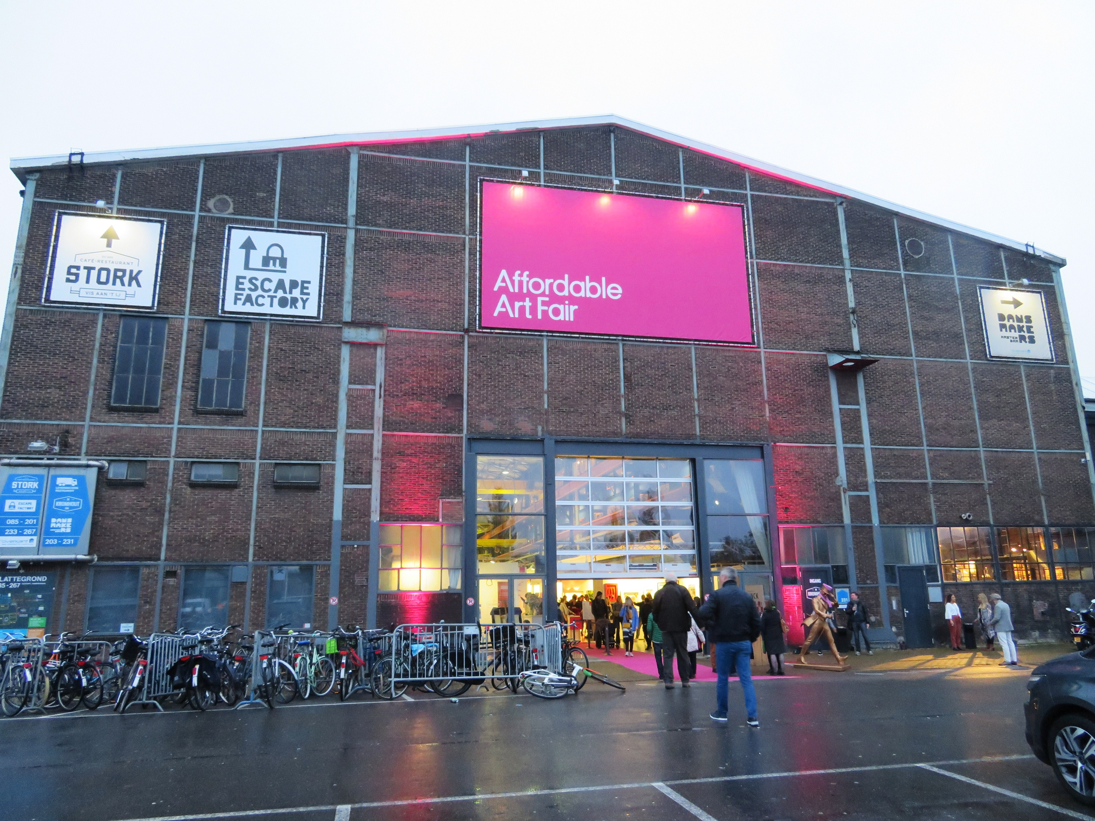 Affordable Art Fair in de Kromhouthal in Amsterdam-Noord. November 2017